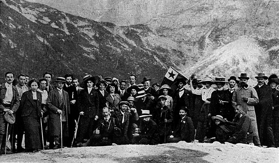 UK 1912 en Krakovo, 1912. Ekskursanoj al Zakopane apud la lago Morskie Oko.